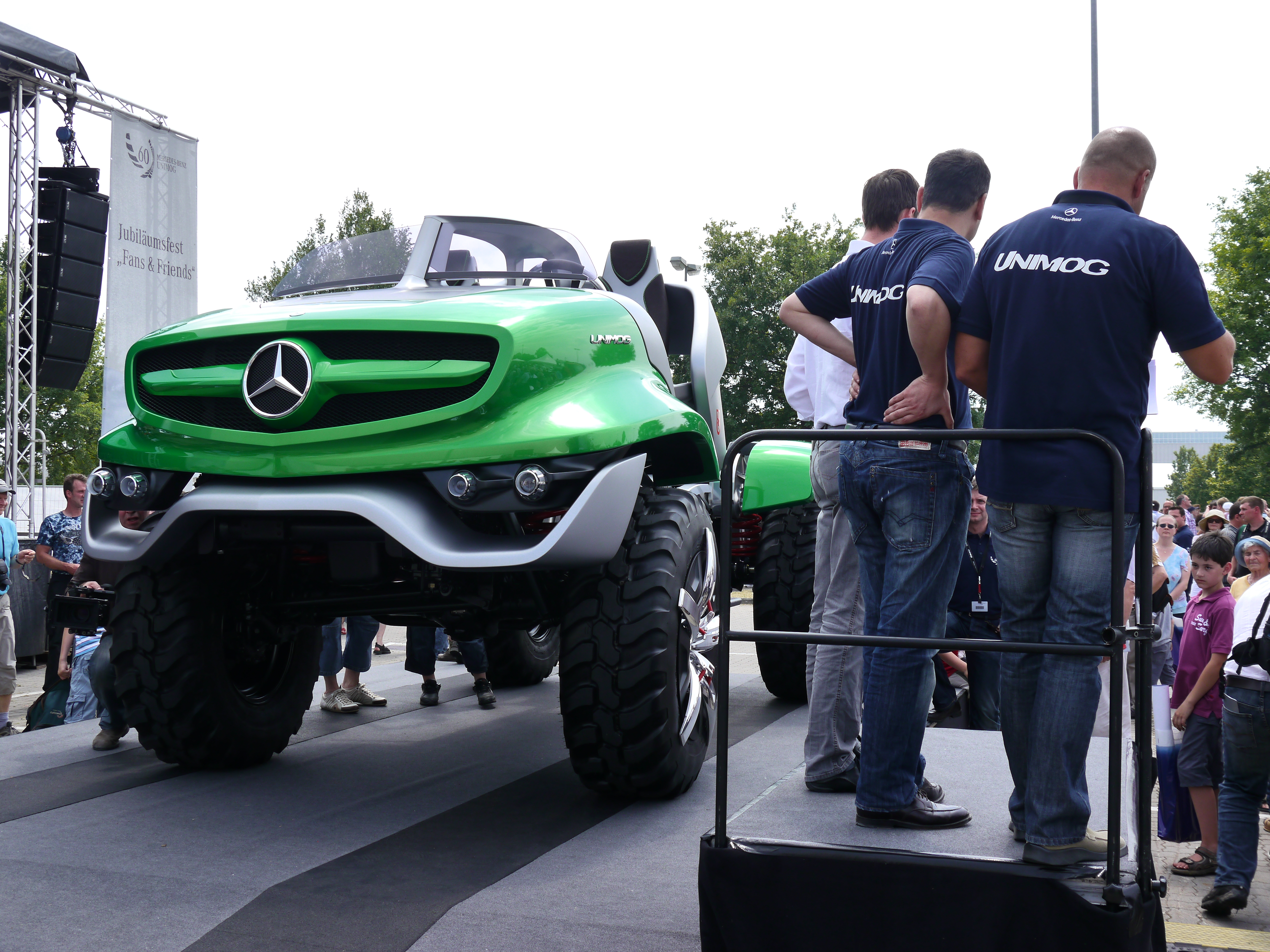 60 Jahre Unimog - Wörth 2011 081 Designstudie